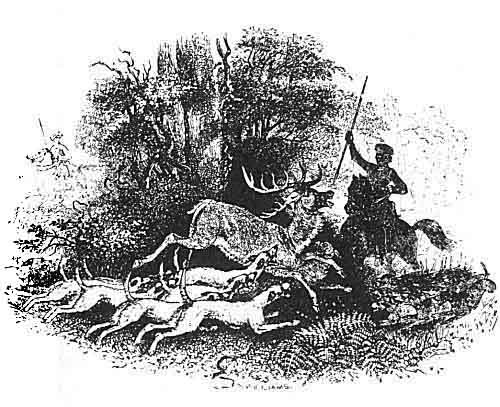 Pwyll Prince of Dyfed hunting with his hounds